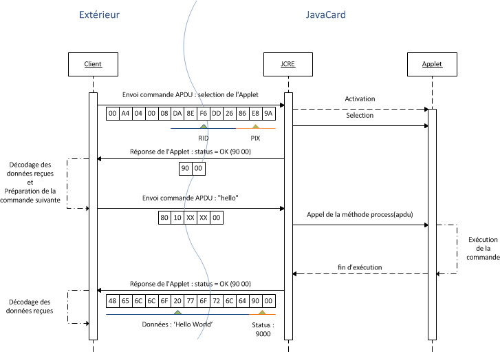 Diagramme appels JavaCard